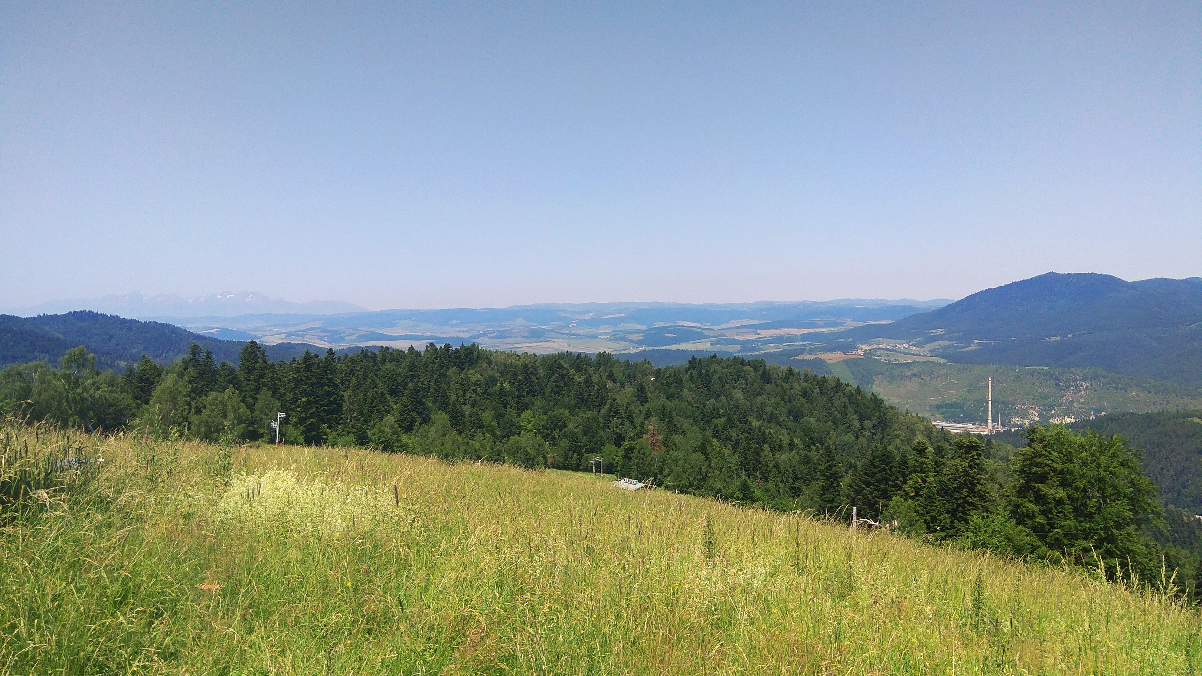 Lyžiarske stredisko Plejsy, záber od horského hotela Hutník (830 m n.m.). Vpravo na zábere Sľubica, vľavo v pozadí Vysoké Tatry.